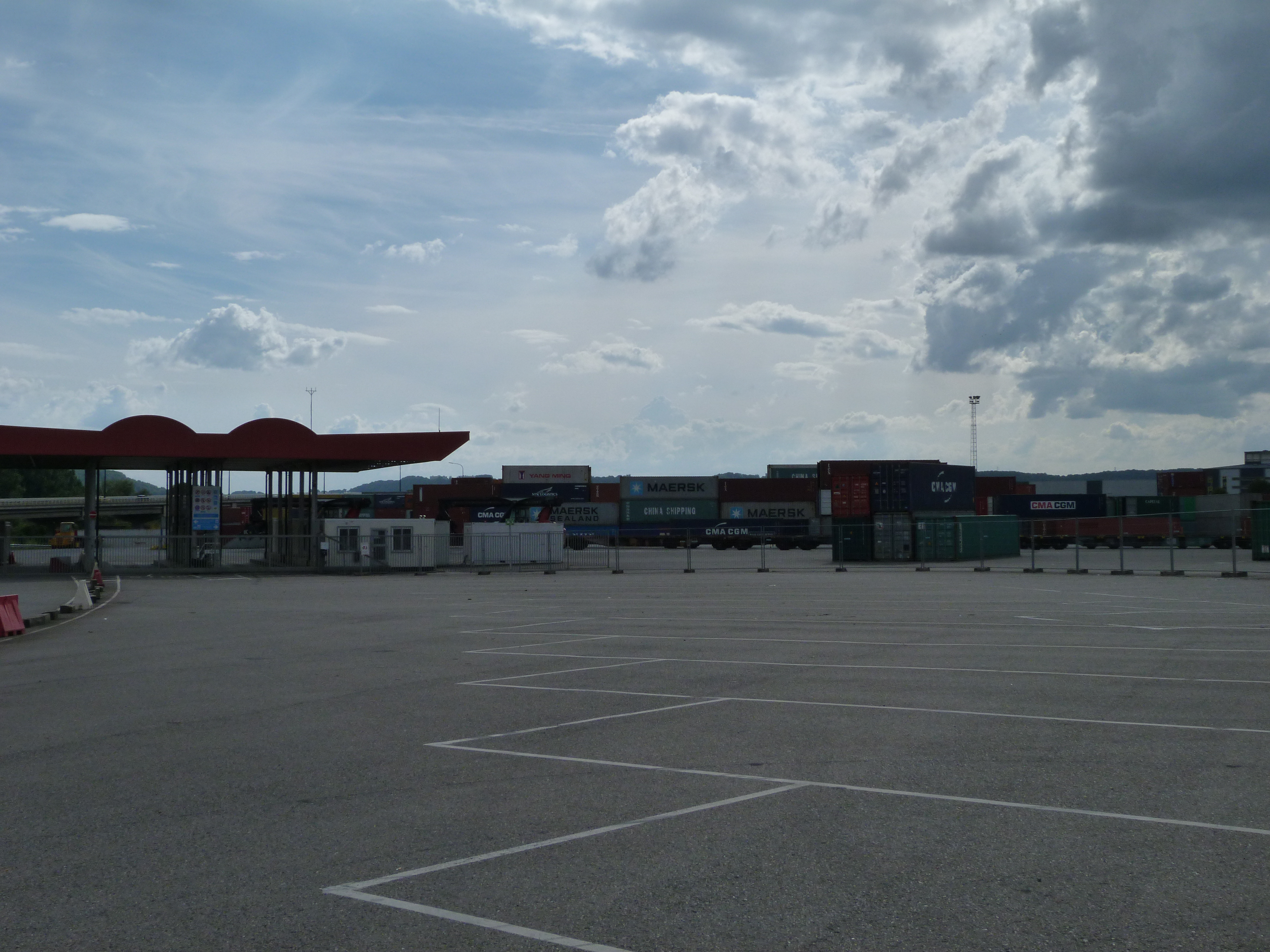 Entrée du TCA (Athus)